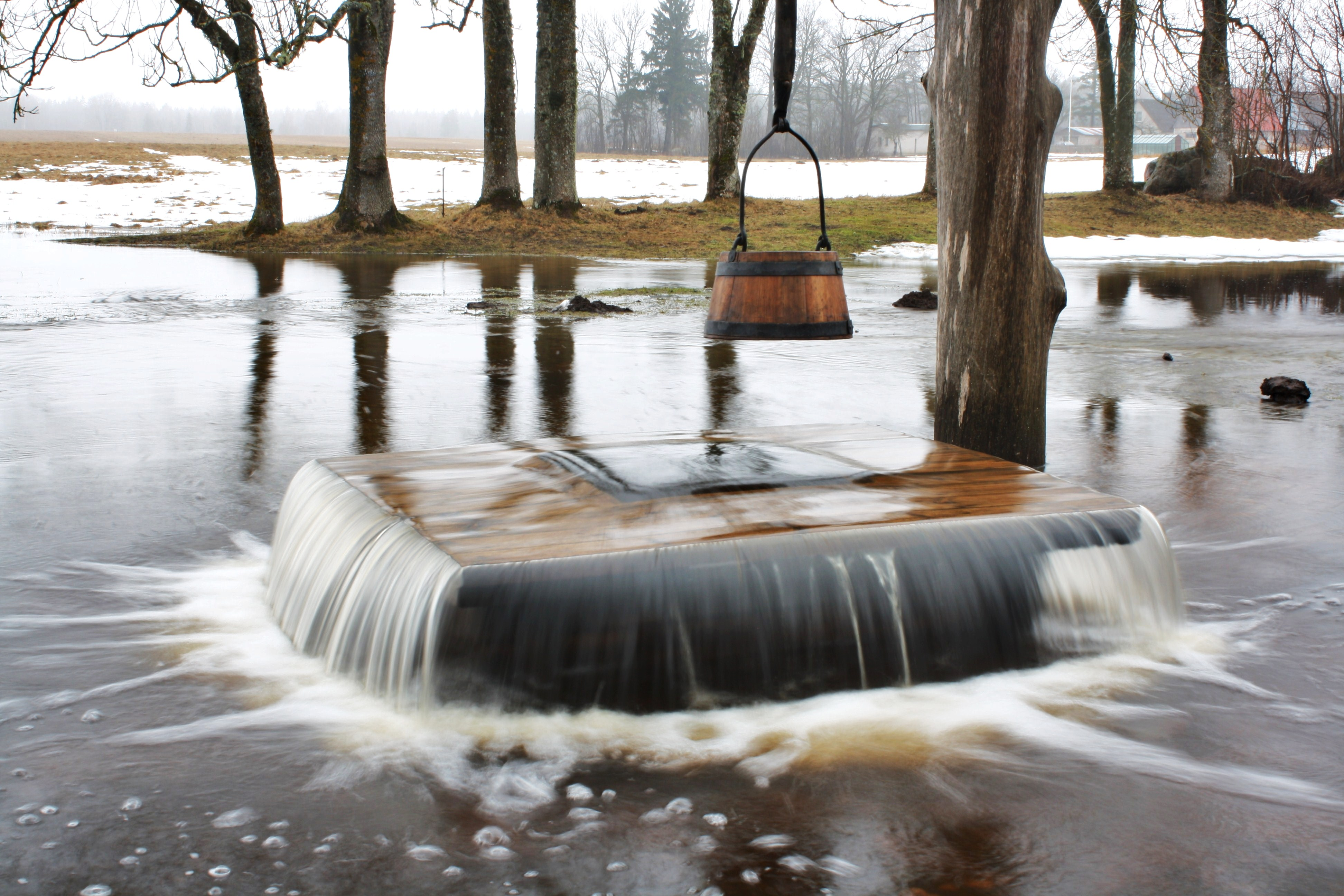 Tuhala Nõiakaev keemas